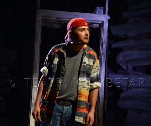 Genti Deçka ne shfaqjen "Mallkimi i fukarenjve"